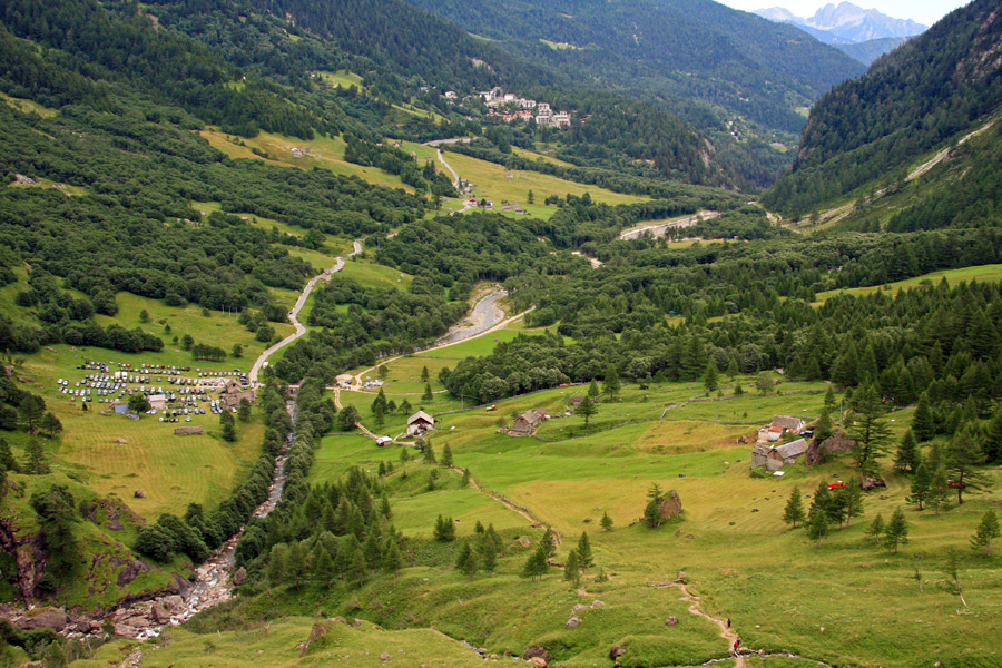 La Piana di Nembro alla testata della Val Cairasca, sotto l'Alpe Veglia. Sullo sfondo l'abitato di San Domenica di Varzo.